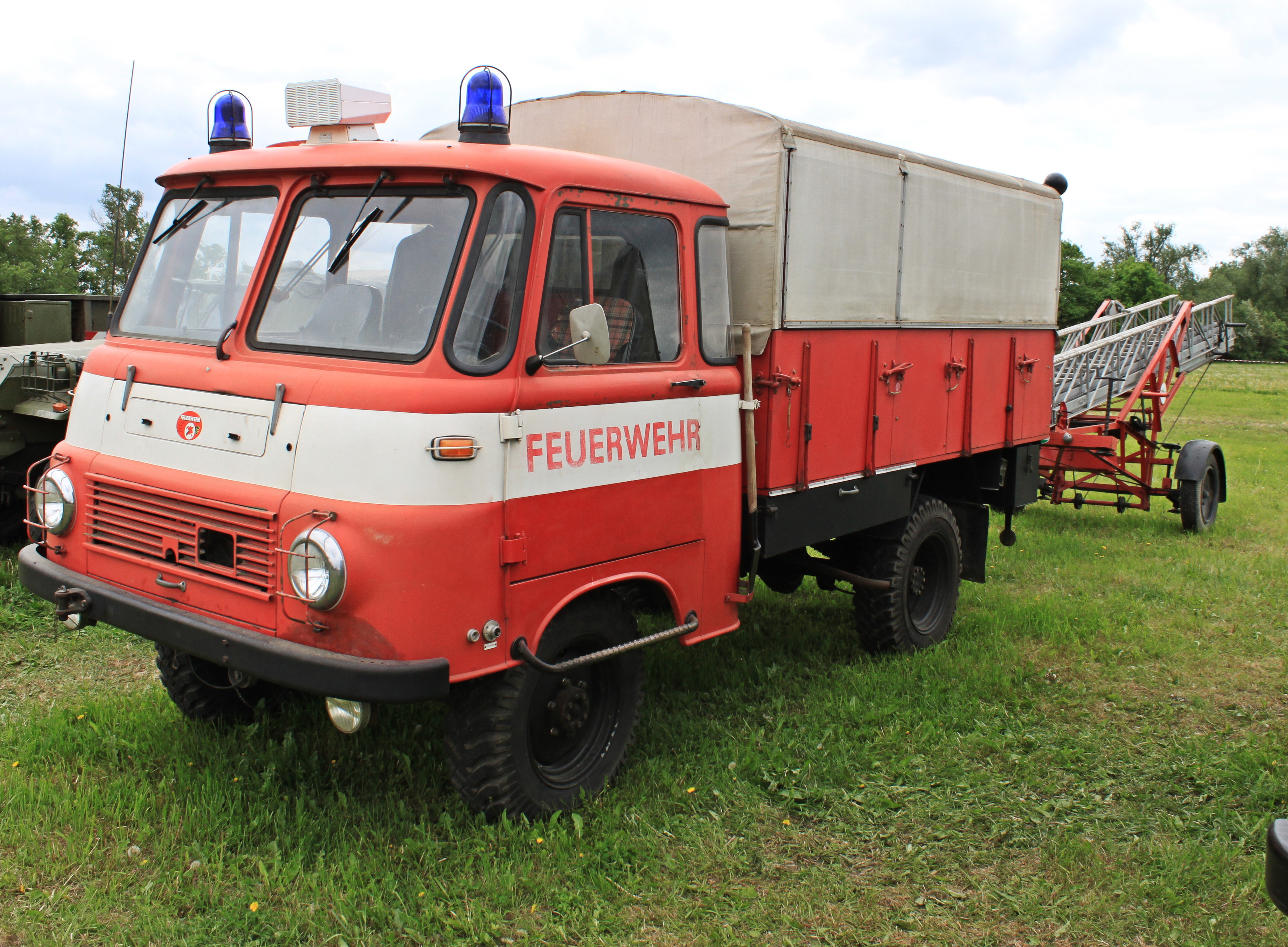 Robur LO 1801 A (Löschgruppenfahrzeug LF 8-TS 8)